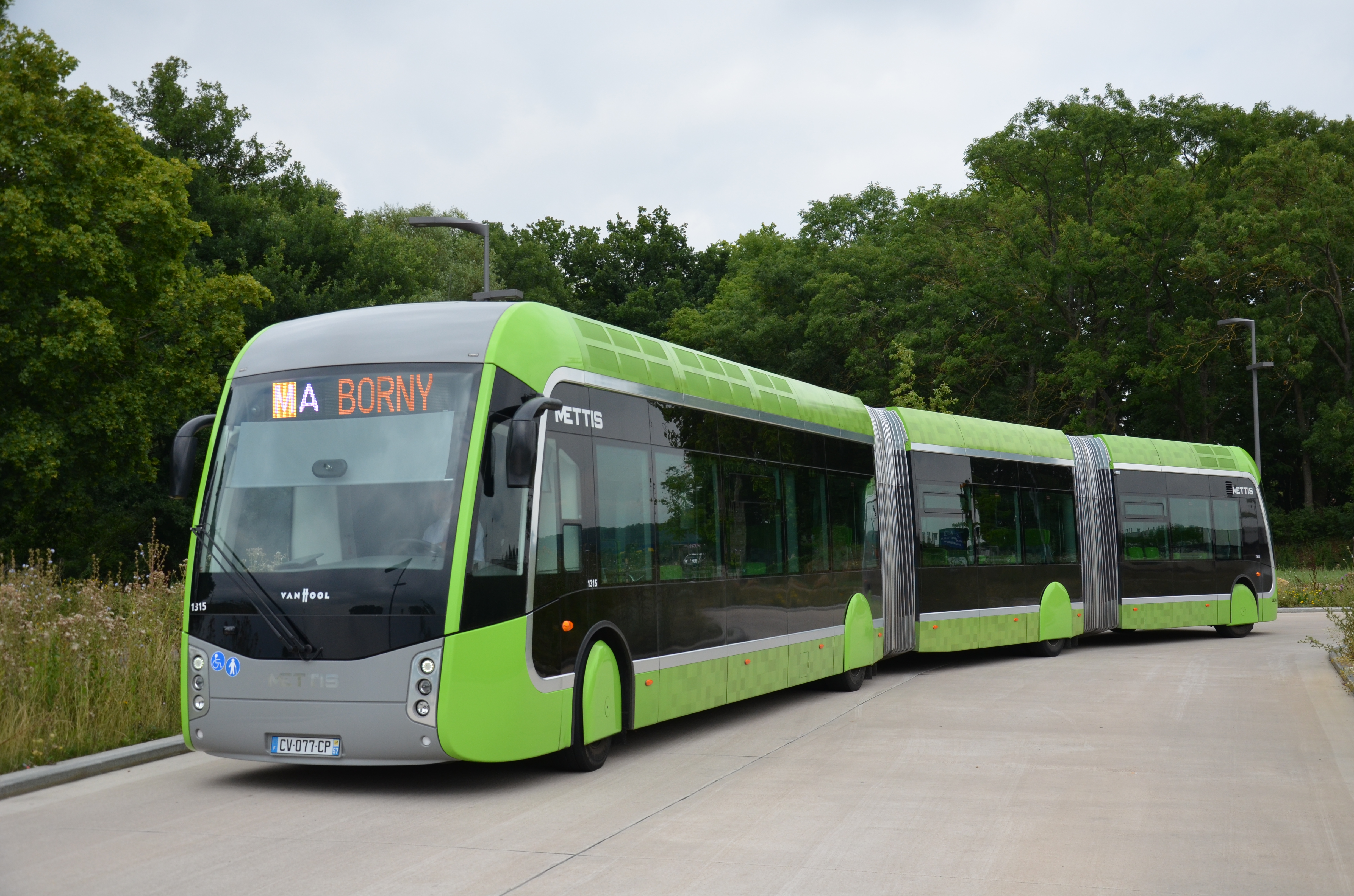 Van Hool ExquiCity 24 METTIS n°1315 au terminus P+R Woippy, sur le réseau LE MET' de Metz